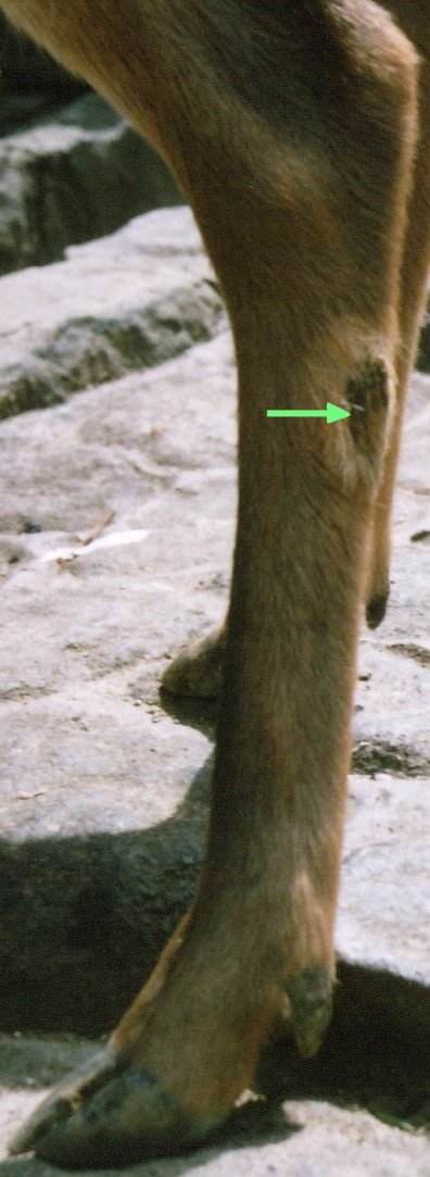 metatarsal glands in a Sika deer